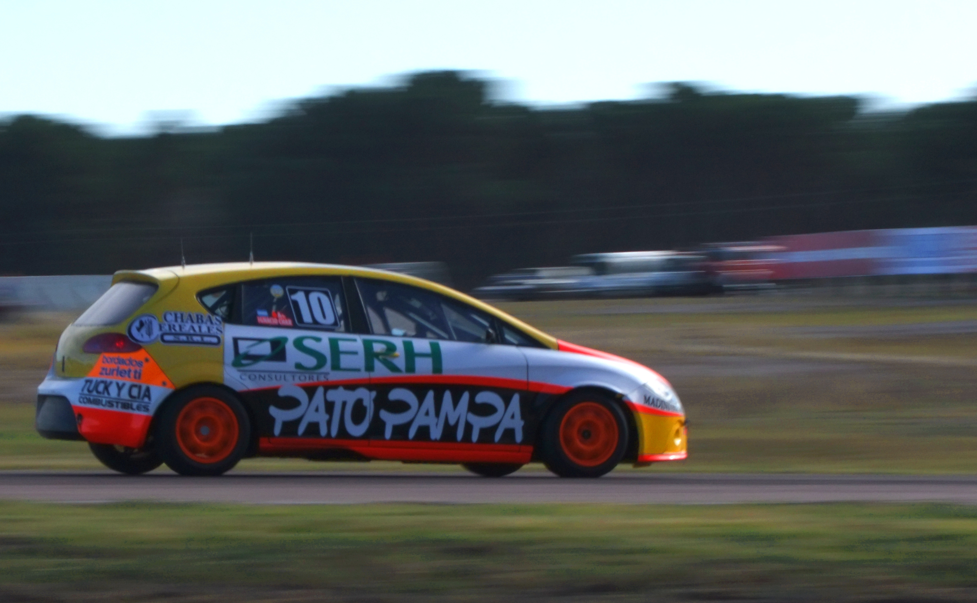 Turismo Nacional Clase 3 2011, Pigüé. Ignacio Char (SEAT León)